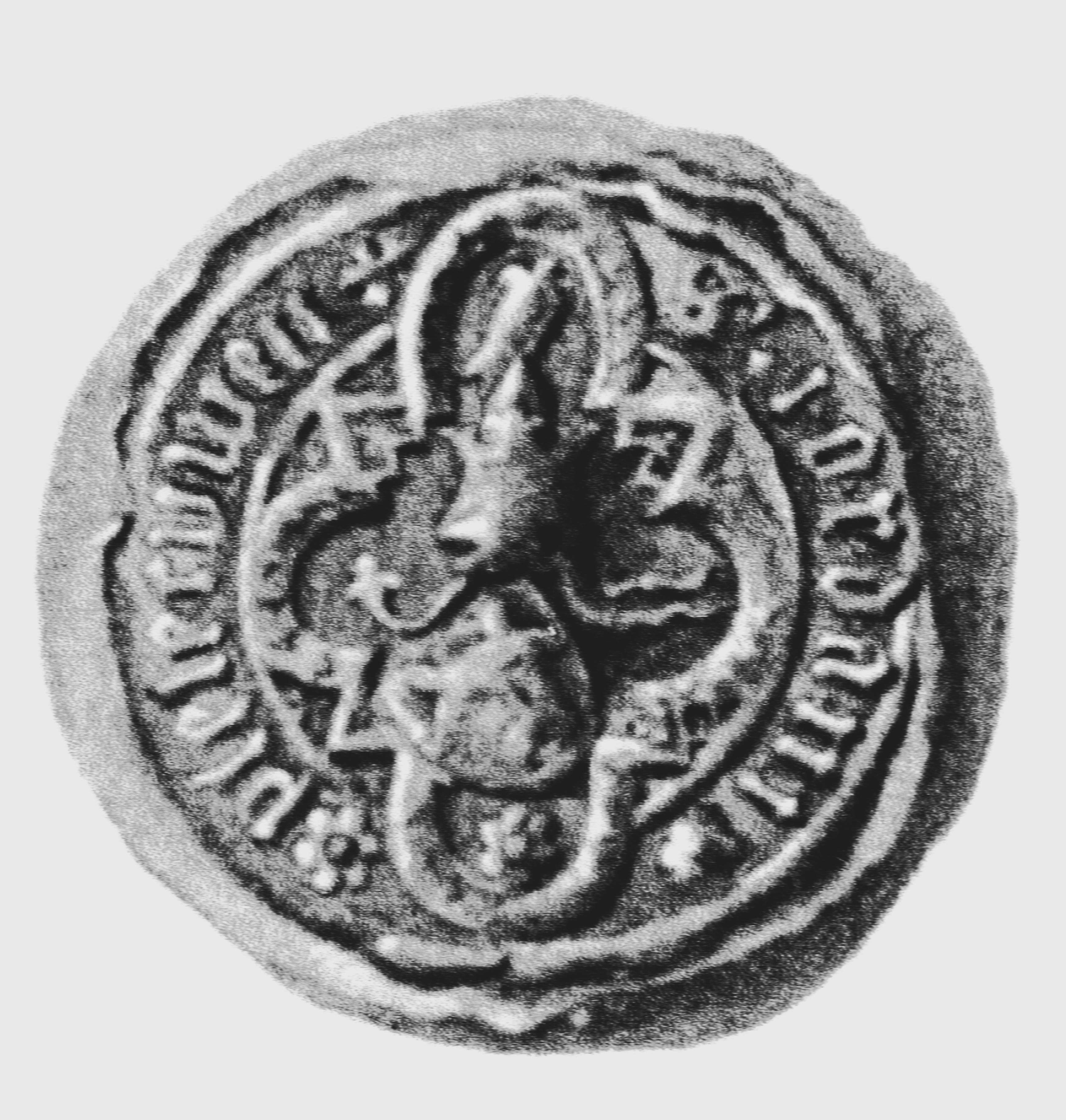 Siegel des Ratsmannes Jordan Pleskow. Das Siegel stammt aus der Zeit um 1408. Siehe Emil Ferdinand Fehling: Lübeckische Ratslinie, Nr. 425 (Jordan Pleskow, BM).